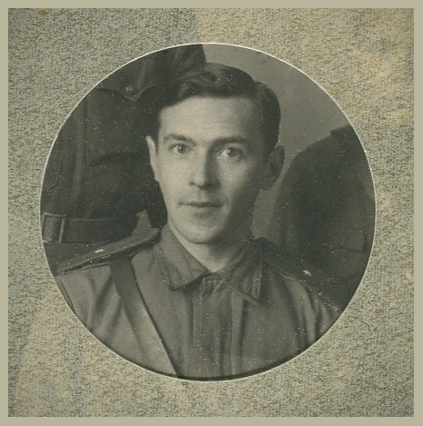 Фотография Тарапыгина П. П., лейтенанта, командира стрелковой роты РККА